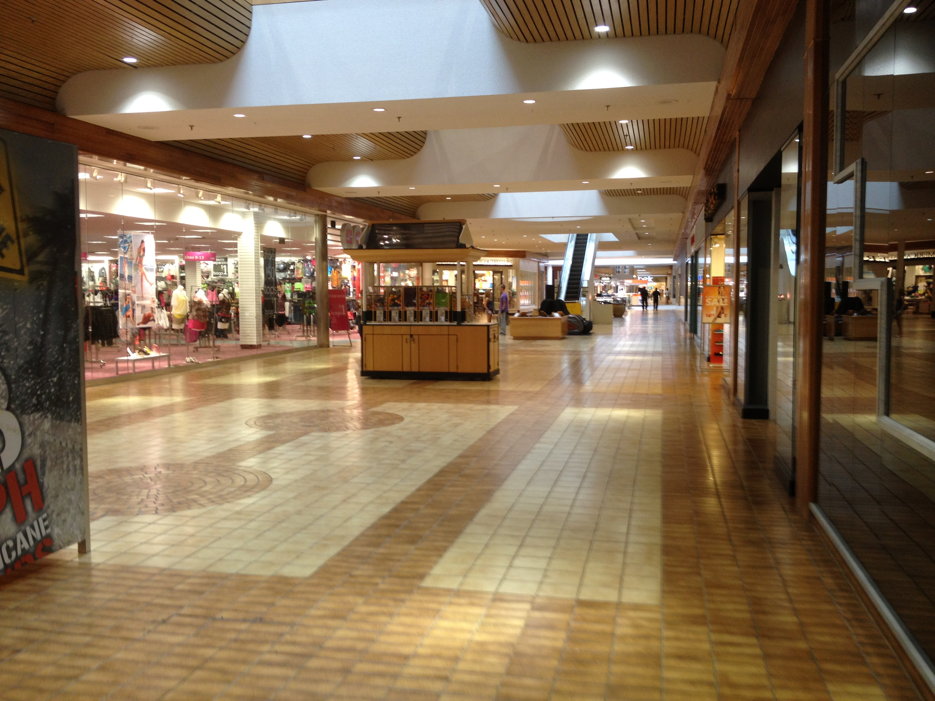 Piedmont Mall Danville, VA